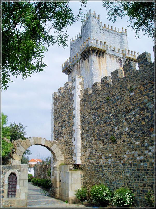 Castle in Beja, Portugal